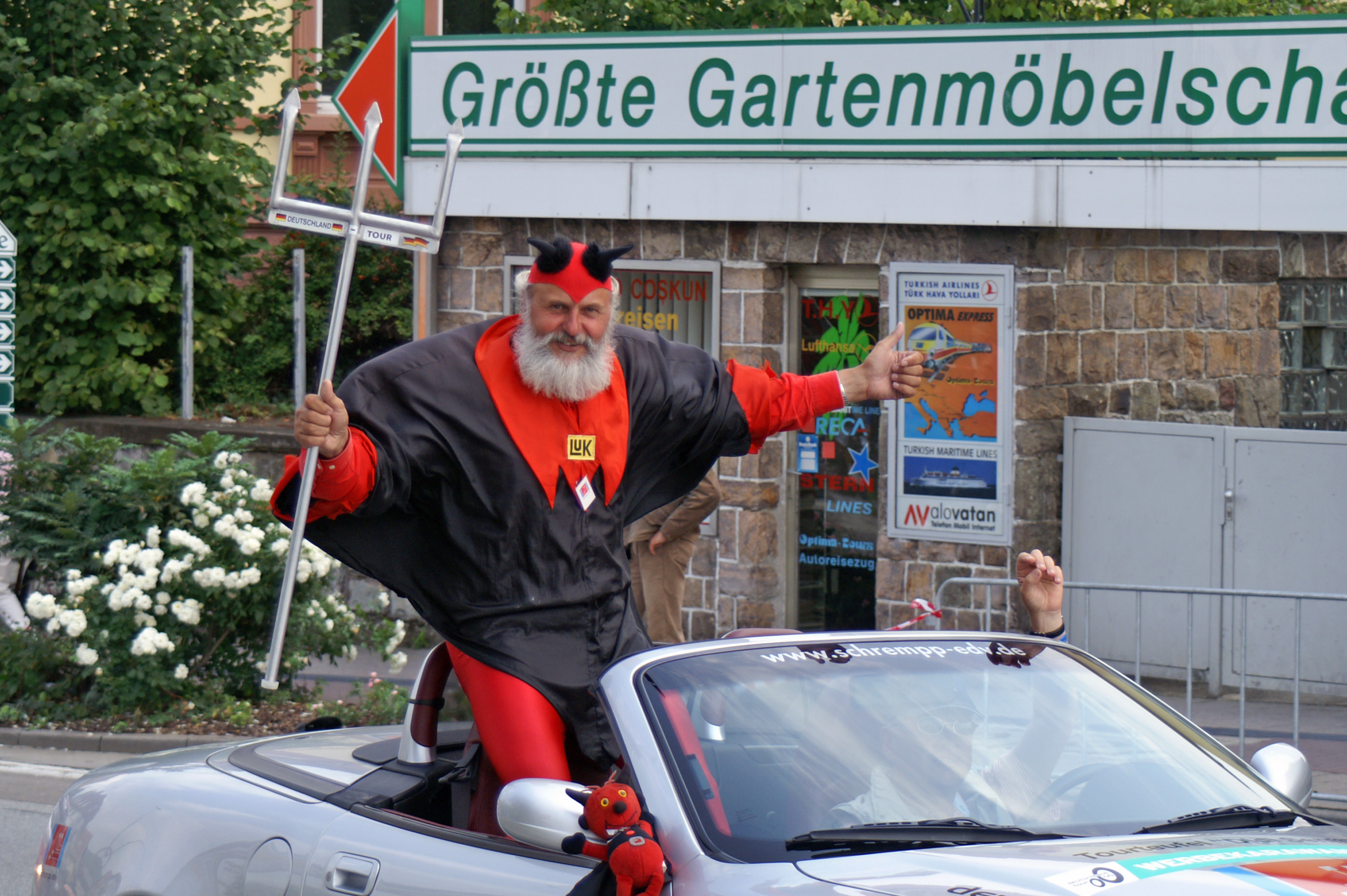 Didi Senft. Deutschlandtour in Weinheim, Germany